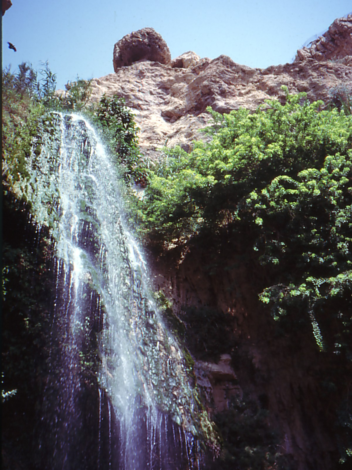 Shulamit Waterfall in Nahal David, En Gedi, Israel Der Schulamit-Wasserfall im Nachal David in der Oase von En Gedi am Toten Meer (Israel)